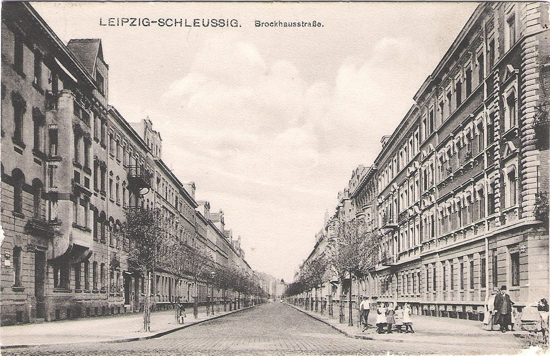 Brockhausstraße in Leipzig-Schleußig um 1910